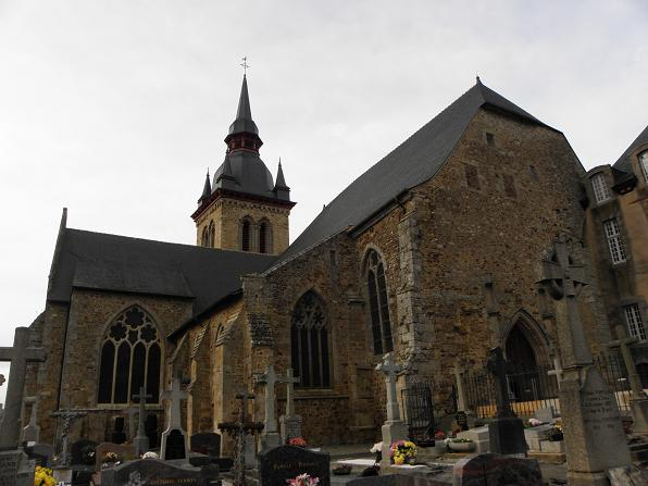 Vue d'ensemble de l'abbatiale de St-Méen-le-Grand (35). .